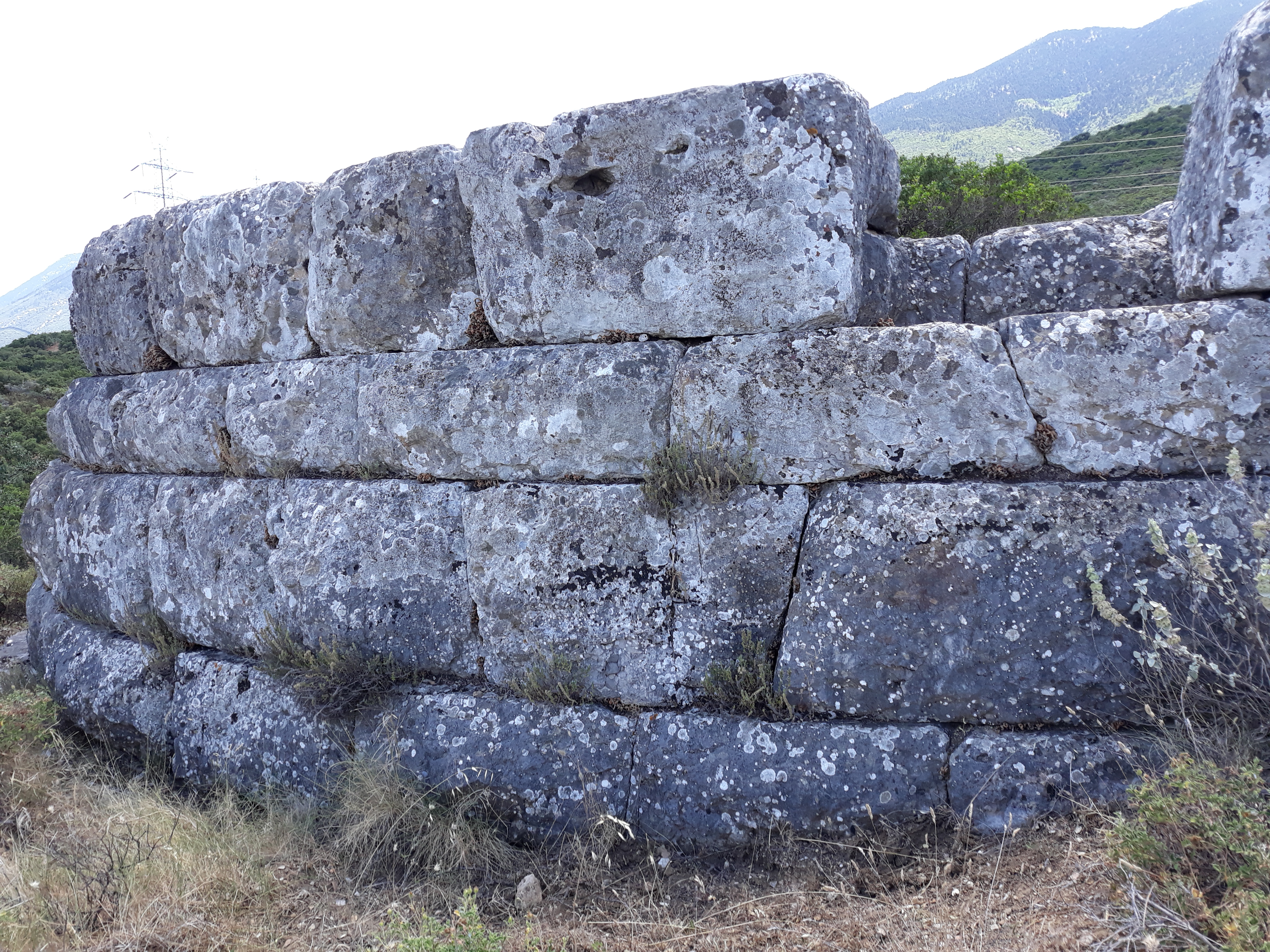 Αρχαίος κυκλικός πύργος με διπλό τείχος στο Καρακόλιθο στη Βοιωτία.